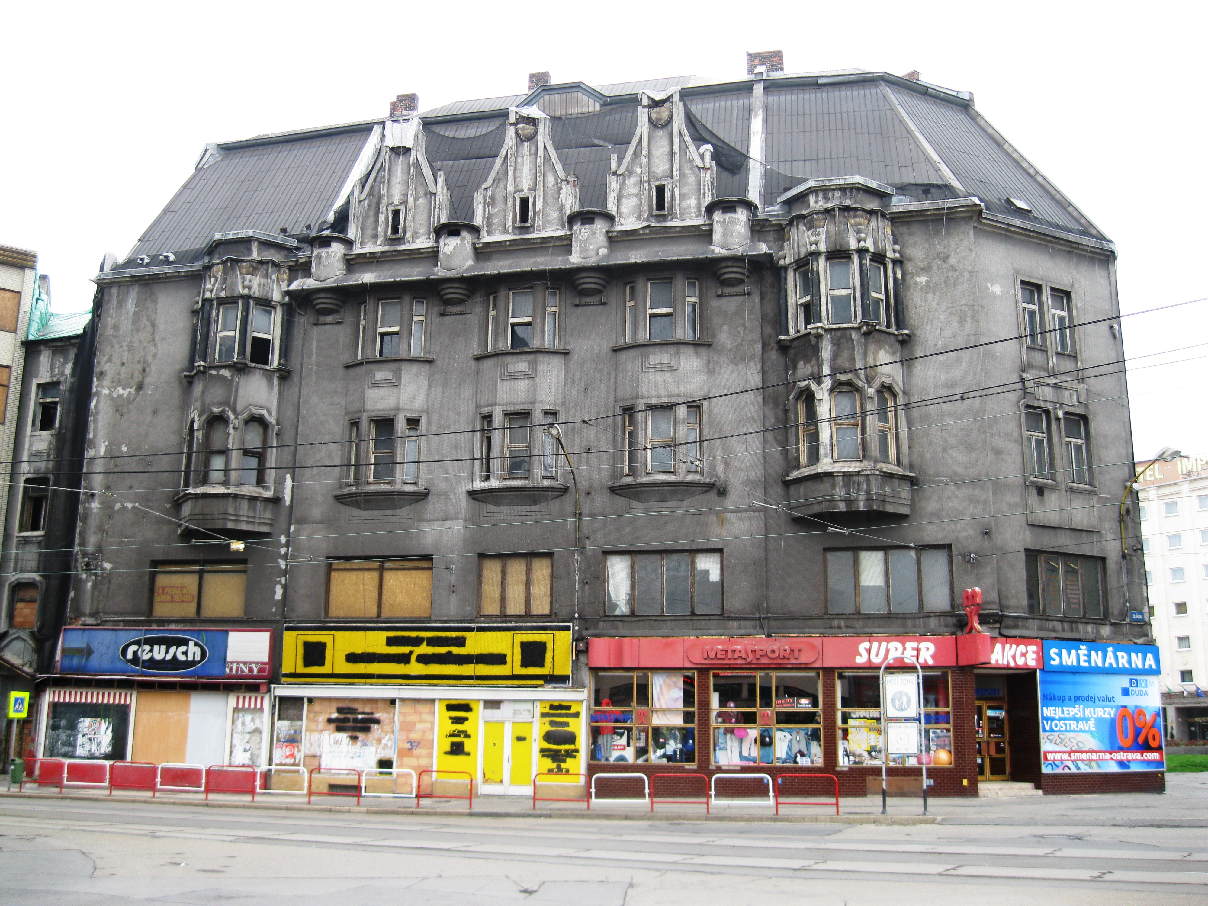 Městský dům (Ostrava), Moravská Ostrava, 28. října 241/54, Ostrava